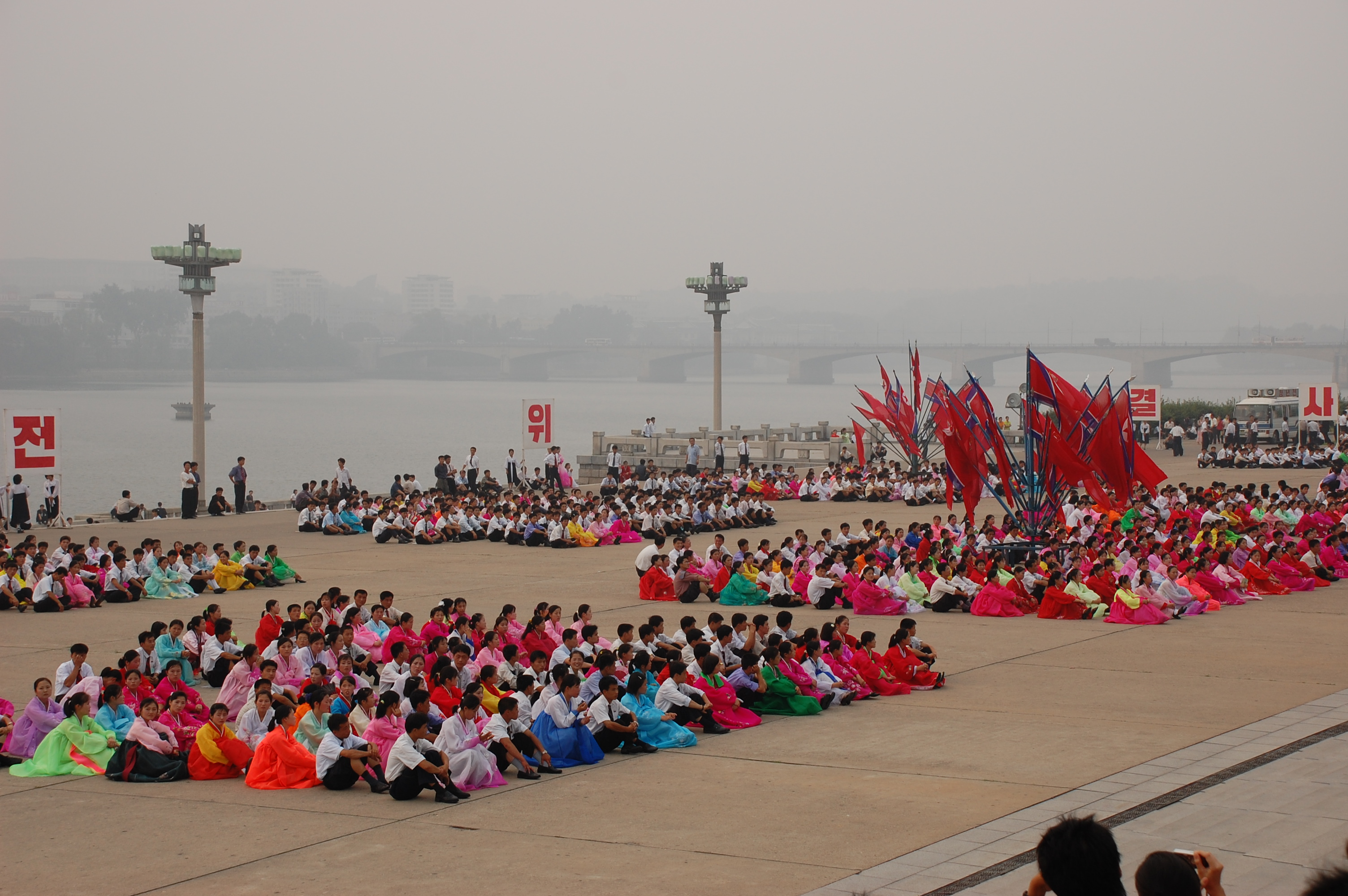 North Korea — Pyongyang